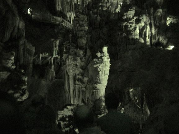 Photo prise dans la salle dite la cathédrale des abysses de la grotte des Demoiselles.